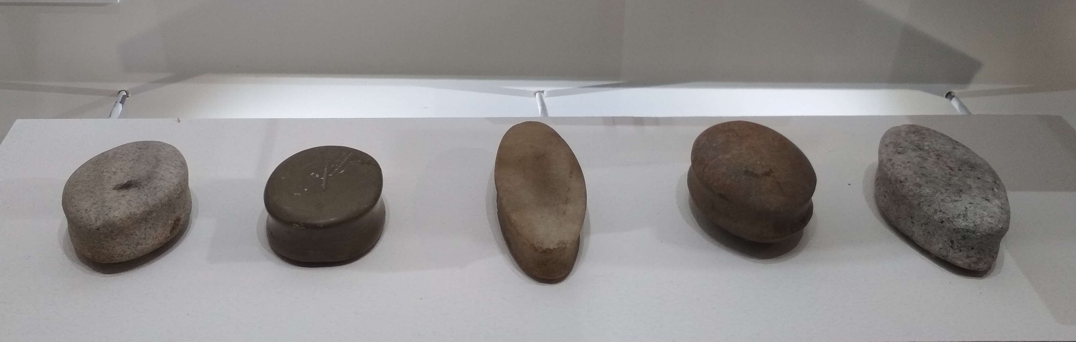 Erinevatest kivimitest, peamisel aga kvartsiidist. Levisid laiemalt 2.-8. sajandil pKr. Võimalik, et kasutati tulega ja viljakasvatusega seotud riitustel. Ca 300-900 pKr.